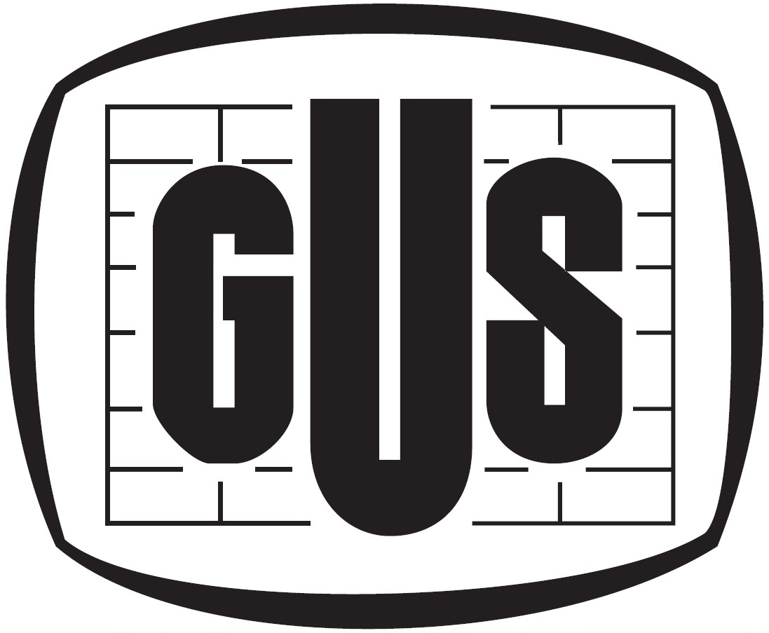 Logo Głównego Urzędu Statystycznego